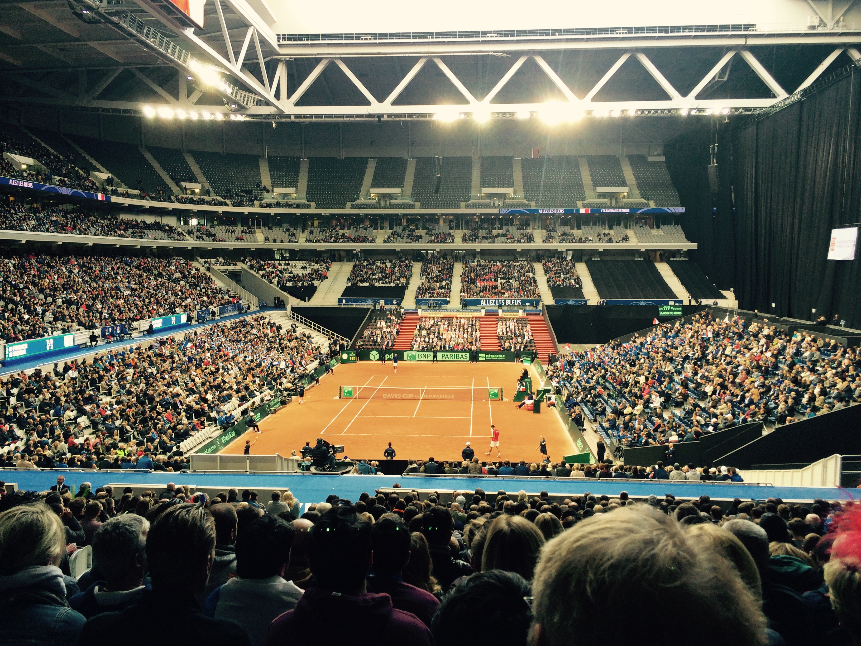 Demi Finale de Coupe Davis France - Serbie en 2017 au Stade Pierre Mauroy